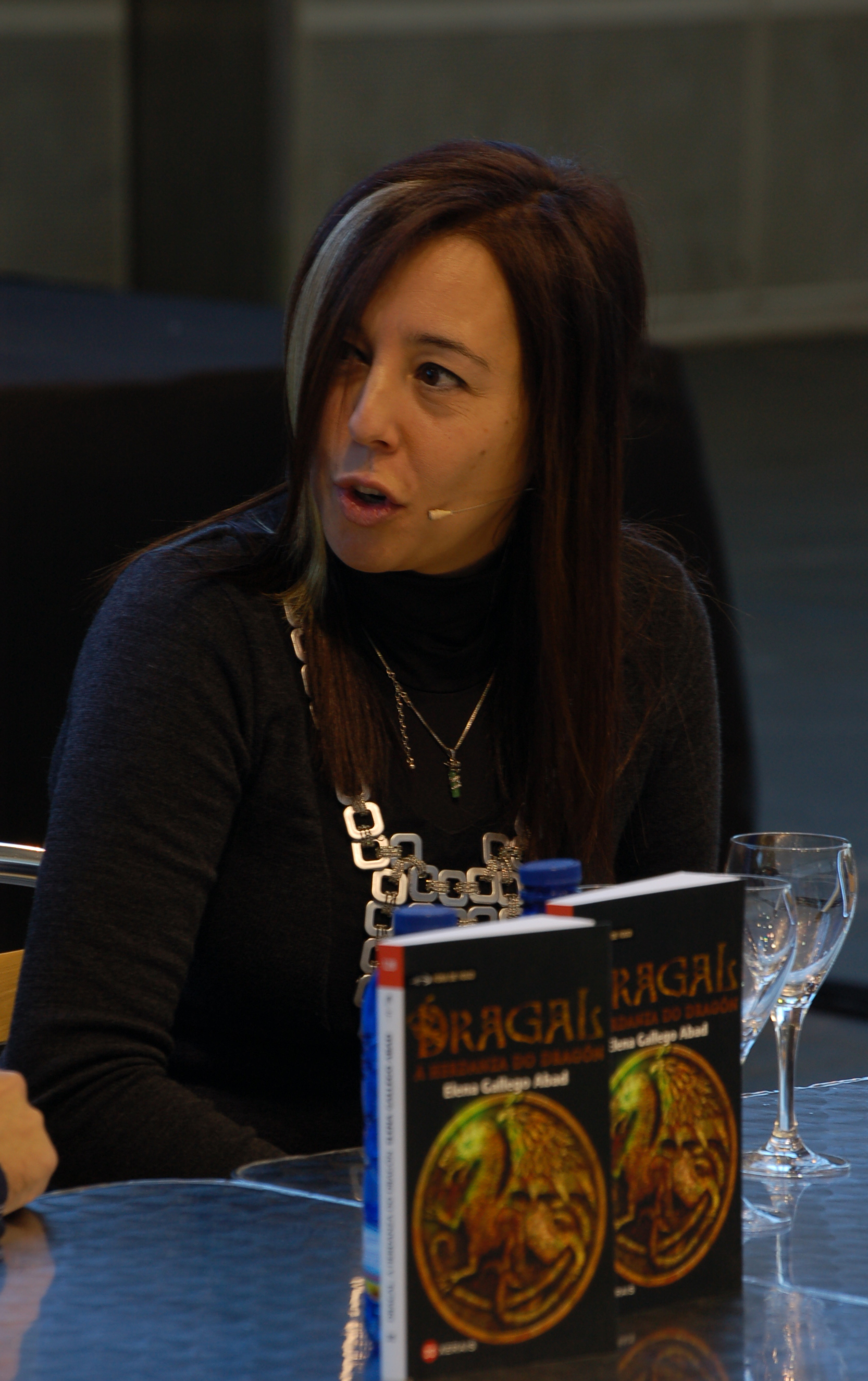 Elena Gallego Abad na presentación de "Dragal, A herdanza do dragón", no CulturGal 2010 no Pazo da Cultura de Pontevedra